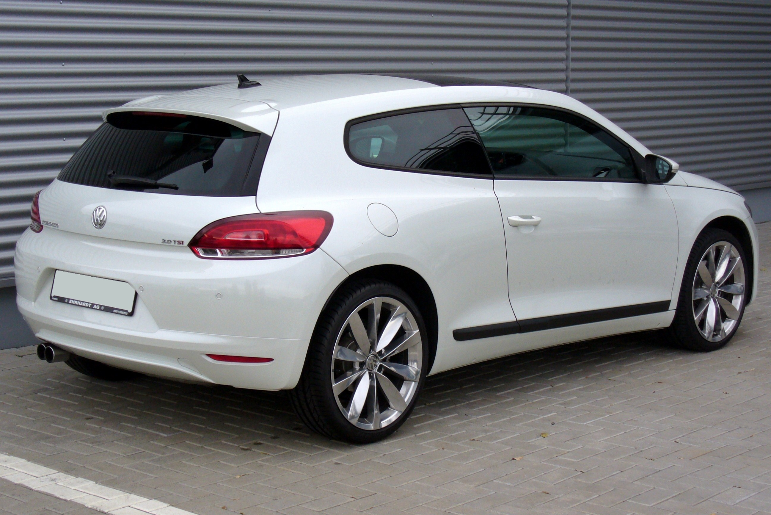 VW Scirocco III